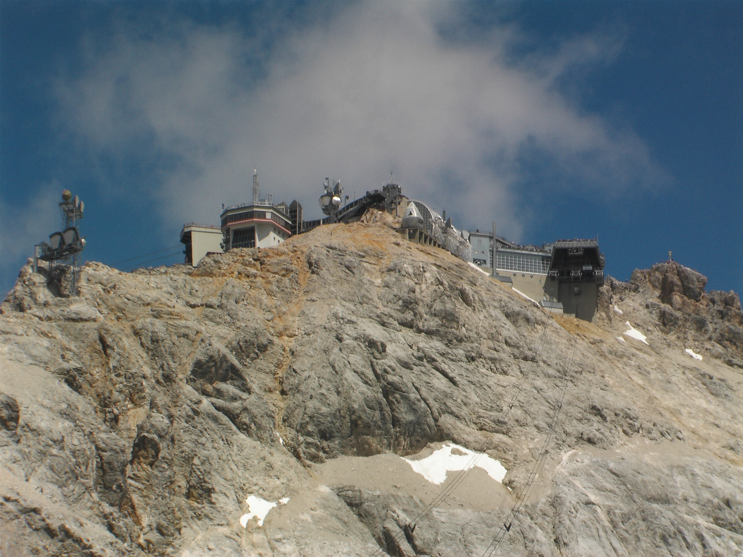 Zugspitze aus Sicht des Zugspitz-Plateaus.